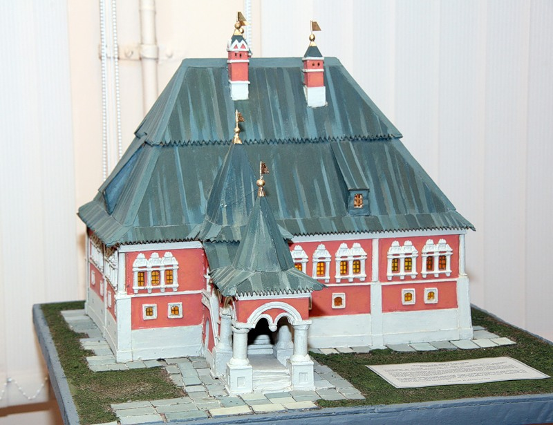 Макет дома Анны Монс, каким он был в конце XVII века. Работа Николая Аввакумова из собрания народного музея "Слобода"